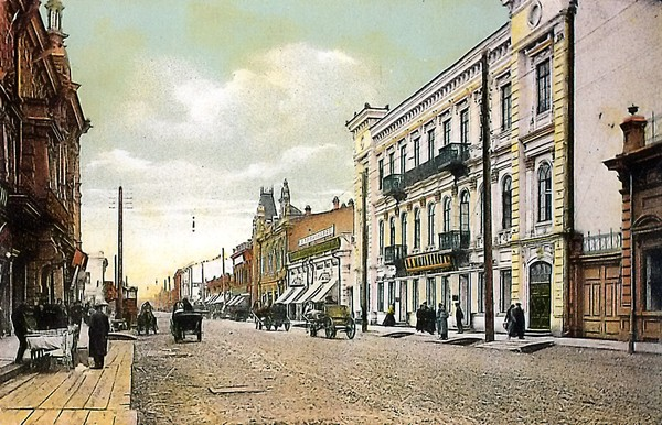 г. Иркутск. Большая улица мариинский приют для девочек.